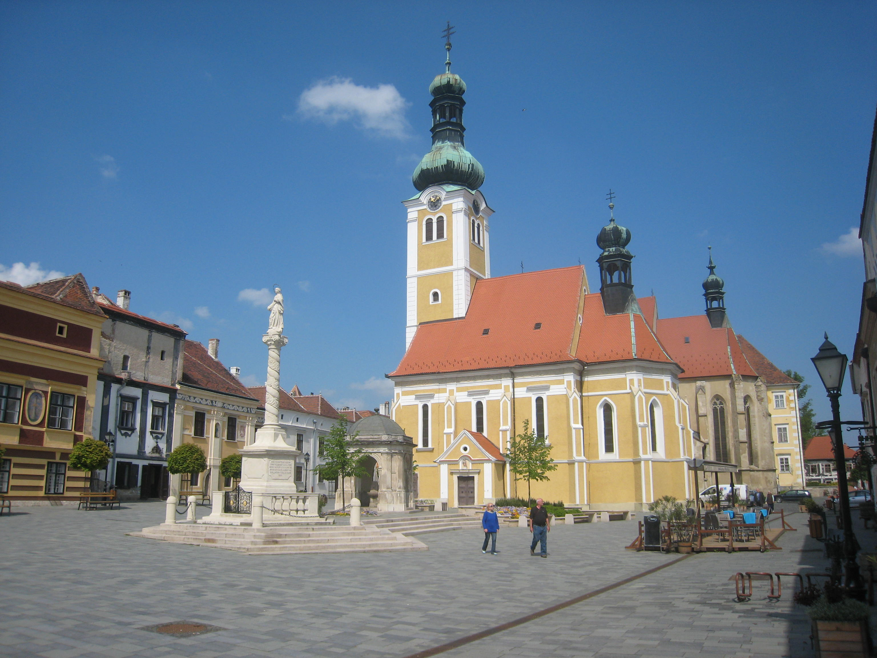 Kiseg, Jurišićev trg s cerkvama sv. Emerika in sv. Jakoba (vzporedno s prvo, za njo).